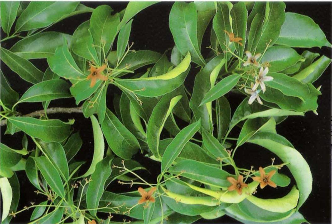 Foto genérica das folhas da árvore de freijó Cordia goeldiana, Brazil